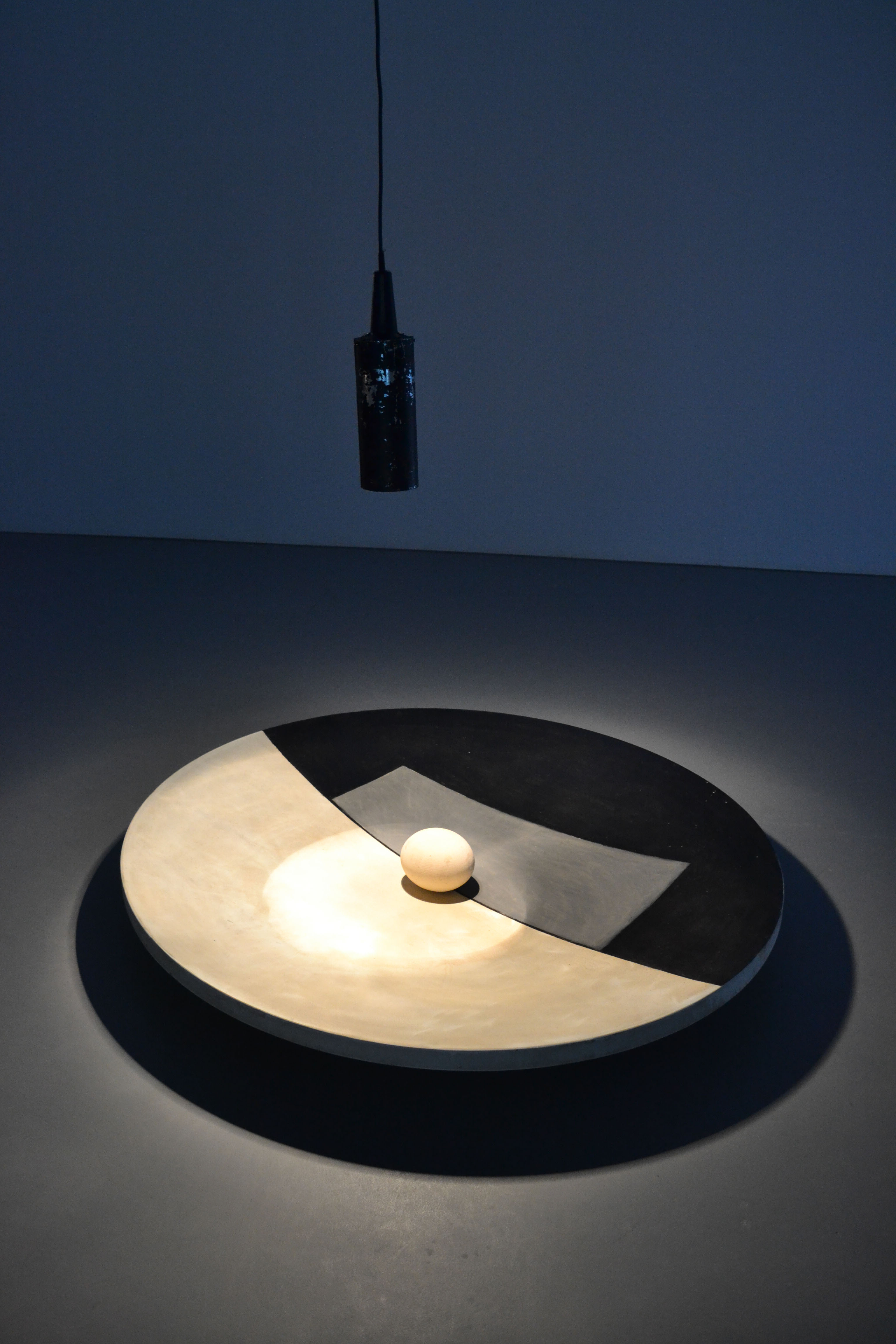 Piotr Lutyński - "Pracownia na Marsie"